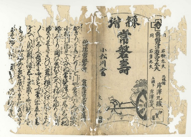 歳旦物『緑増常磐寿（みどりますときわのことぶき）』は、その詞章に安永年間における約50名の常磐津女流演奏家の芸名が詠み込まれており、従来の日本音楽史における「女性演奏家が活躍し始めるのは幕末頃（1853年－1869年）」という定説を大きく覆し、作品自体の希少性とは別に「1700年代にはすでに多くの女性が活躍していた」という発見をともなった、歴史的意義のある貴重な史料であることがわかった。